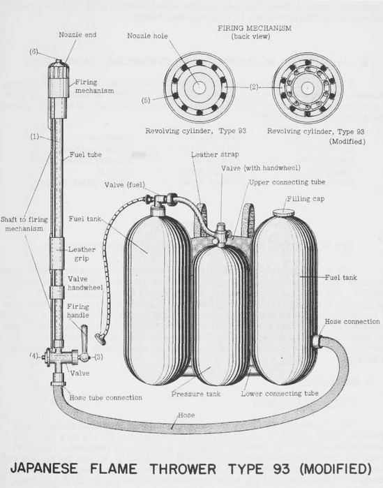 lance-flammes japonais (dessin américain WW2) Type 93